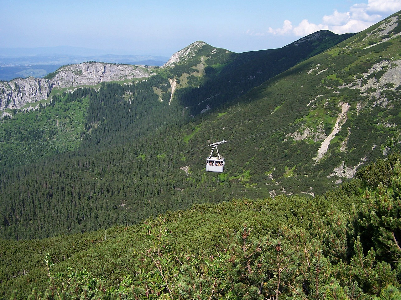 Dolina Kasprowa